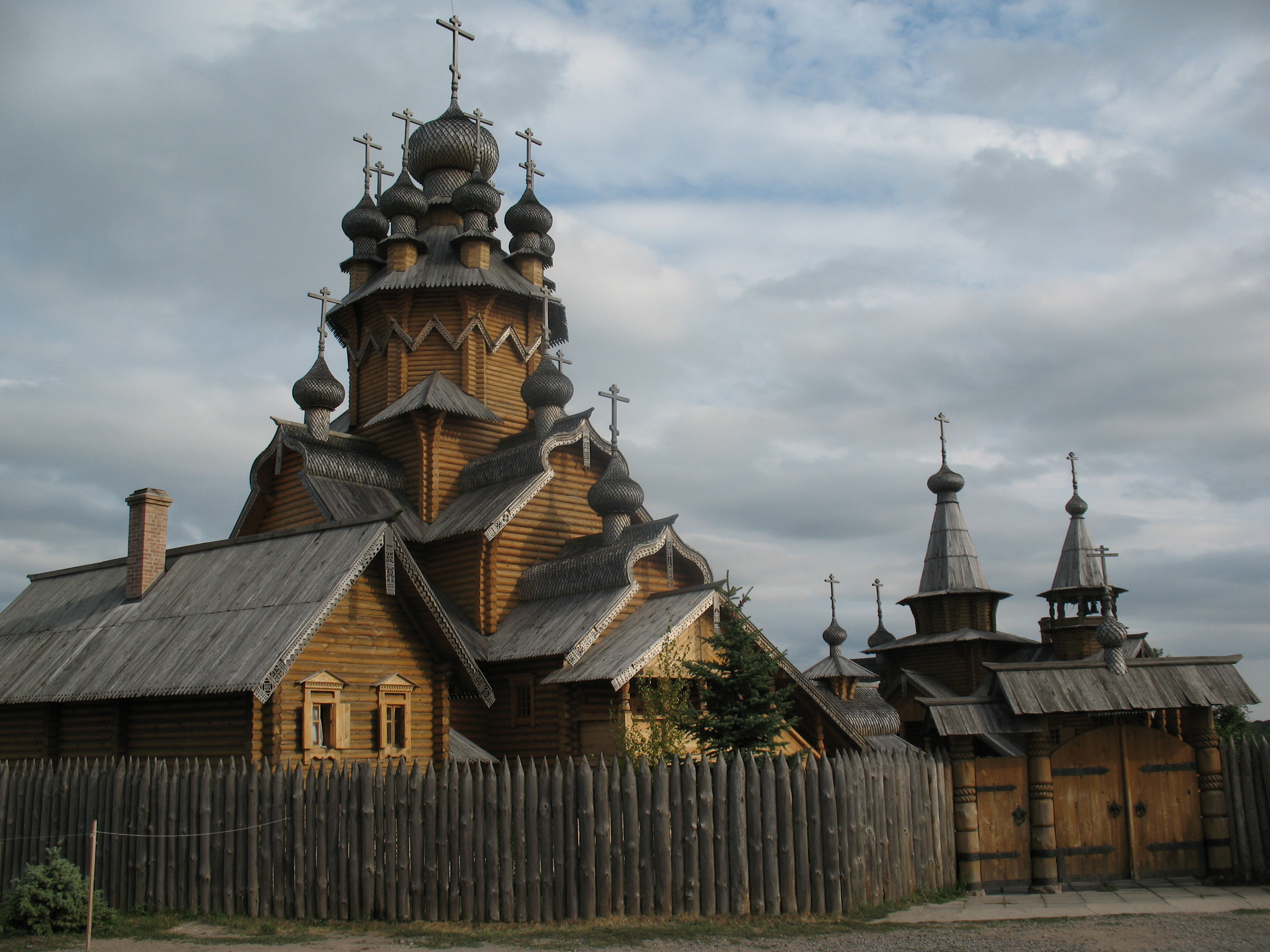 Деревянная церковь Всех Святых Всехсвятского скита на территории Святогорской лавры. Построена монахами Лавры.